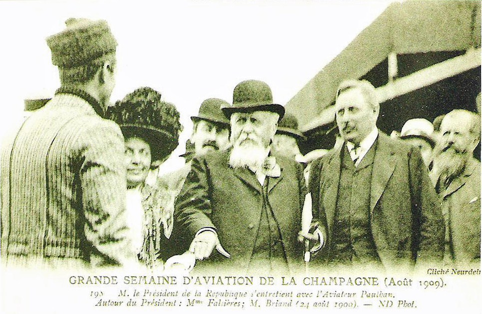 Armand_Fallières_, carte postale de la Bibliothèque Municipale de Reims sous la réf :_38-341, Louis _Paulhan .